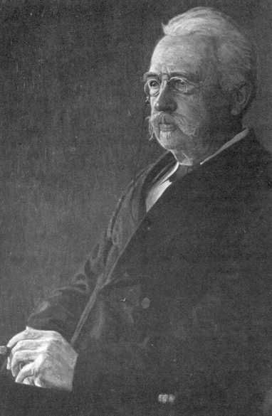 Posthumt maleri af Holger Hammerich. Malet af Kai Lange (1870-1936).